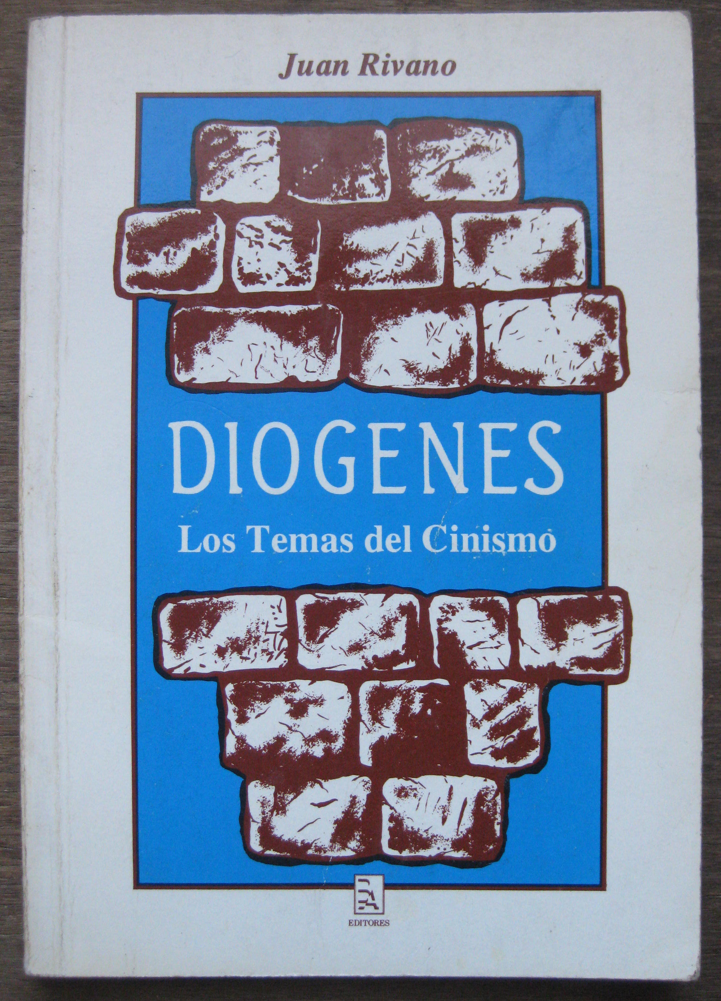 Libro de filosofía de Juan Rivano. Bravo y Allende Editores. 1991. Impreso en Chile.